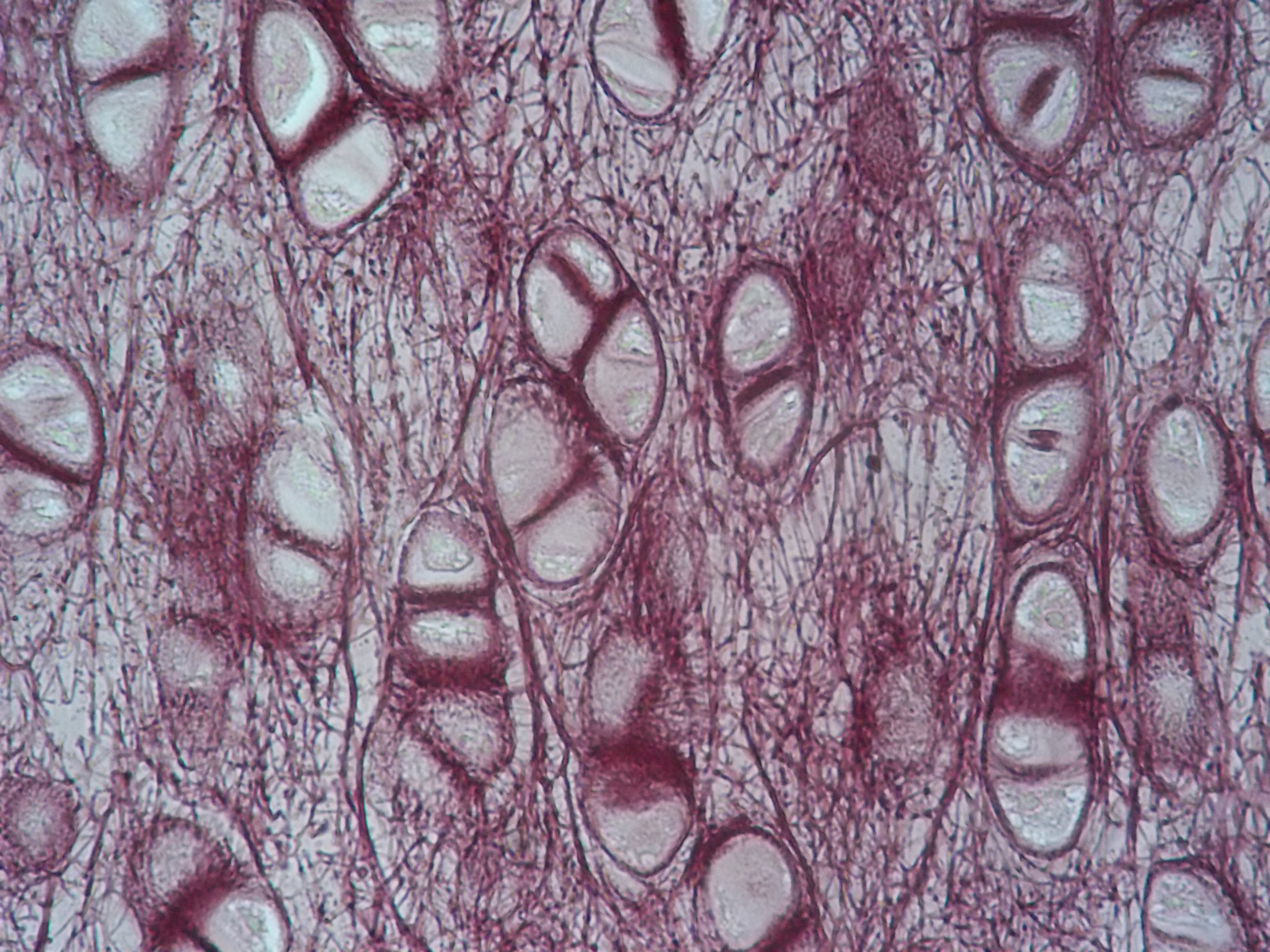 Cartílago elástico; 400 X.